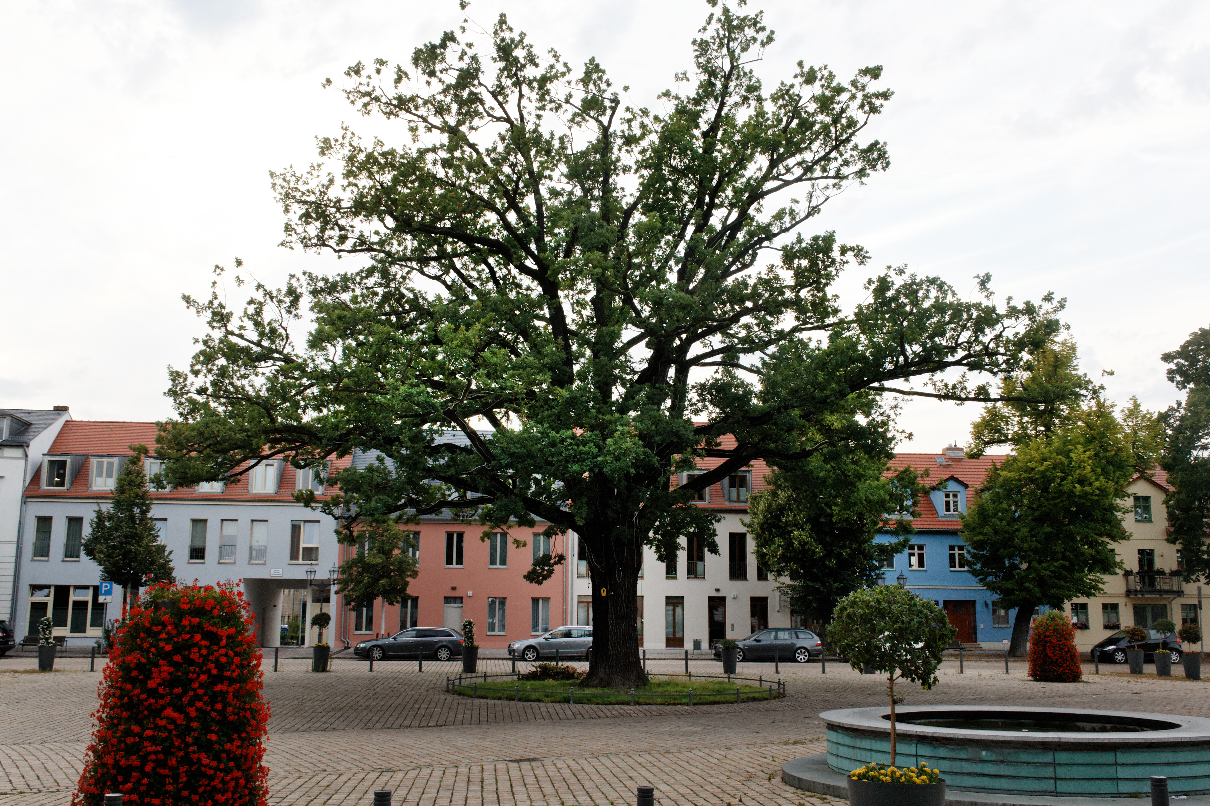 Eichenbaum, als Naturdenkmal gekennzeichnet, auf dem Marktplatz in Werder (Havel).